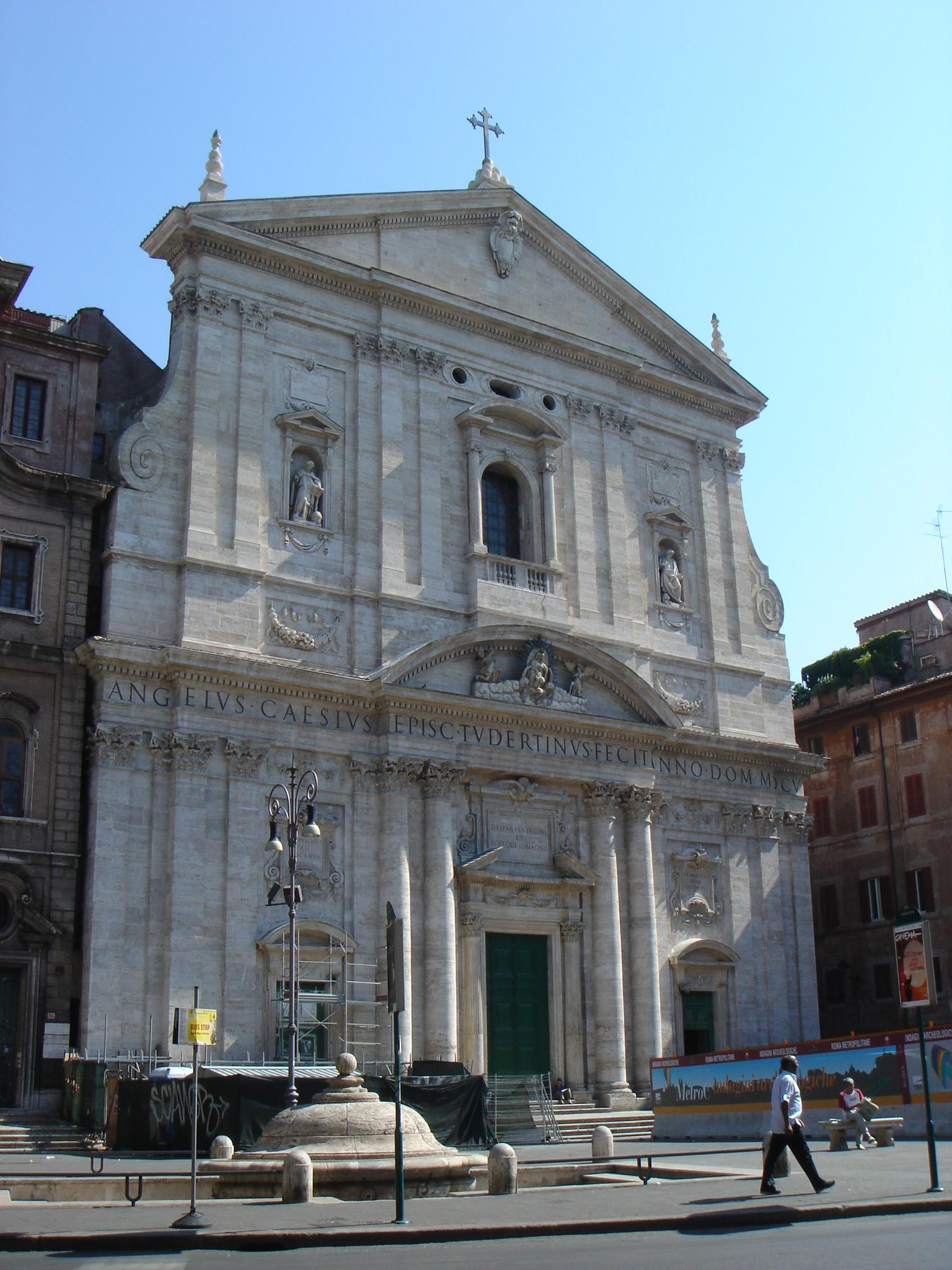 Roma, Santa Maria in Vallicella (detta "la Chiesa Nuova") appena restaurata.